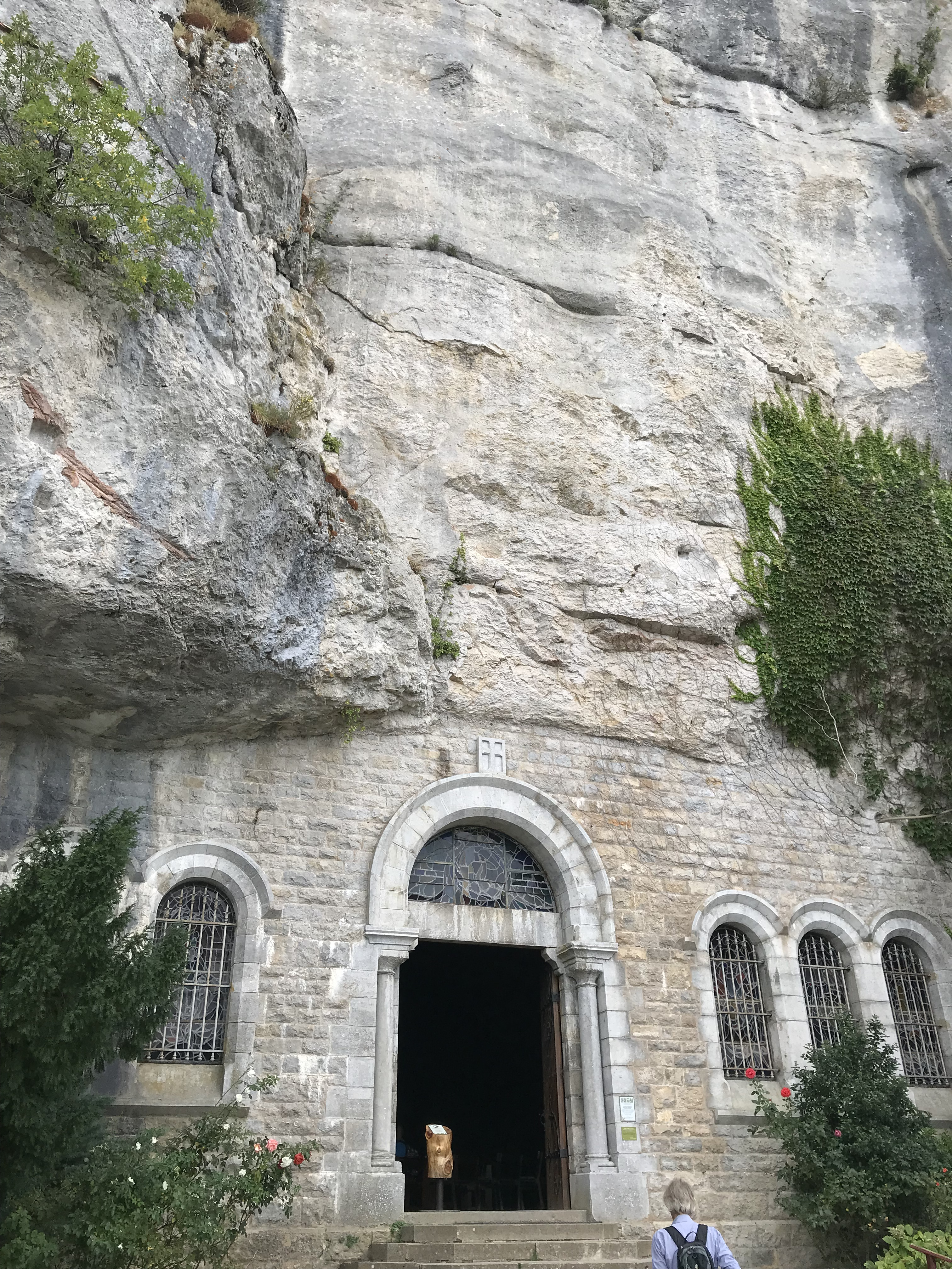 Grot in de bergketen ‘Massif-de-la-St.-Baume waar Maria Magdalena volgens de overlevering 30 jaar verbleven heeft na haar aankomst in Frankrijk